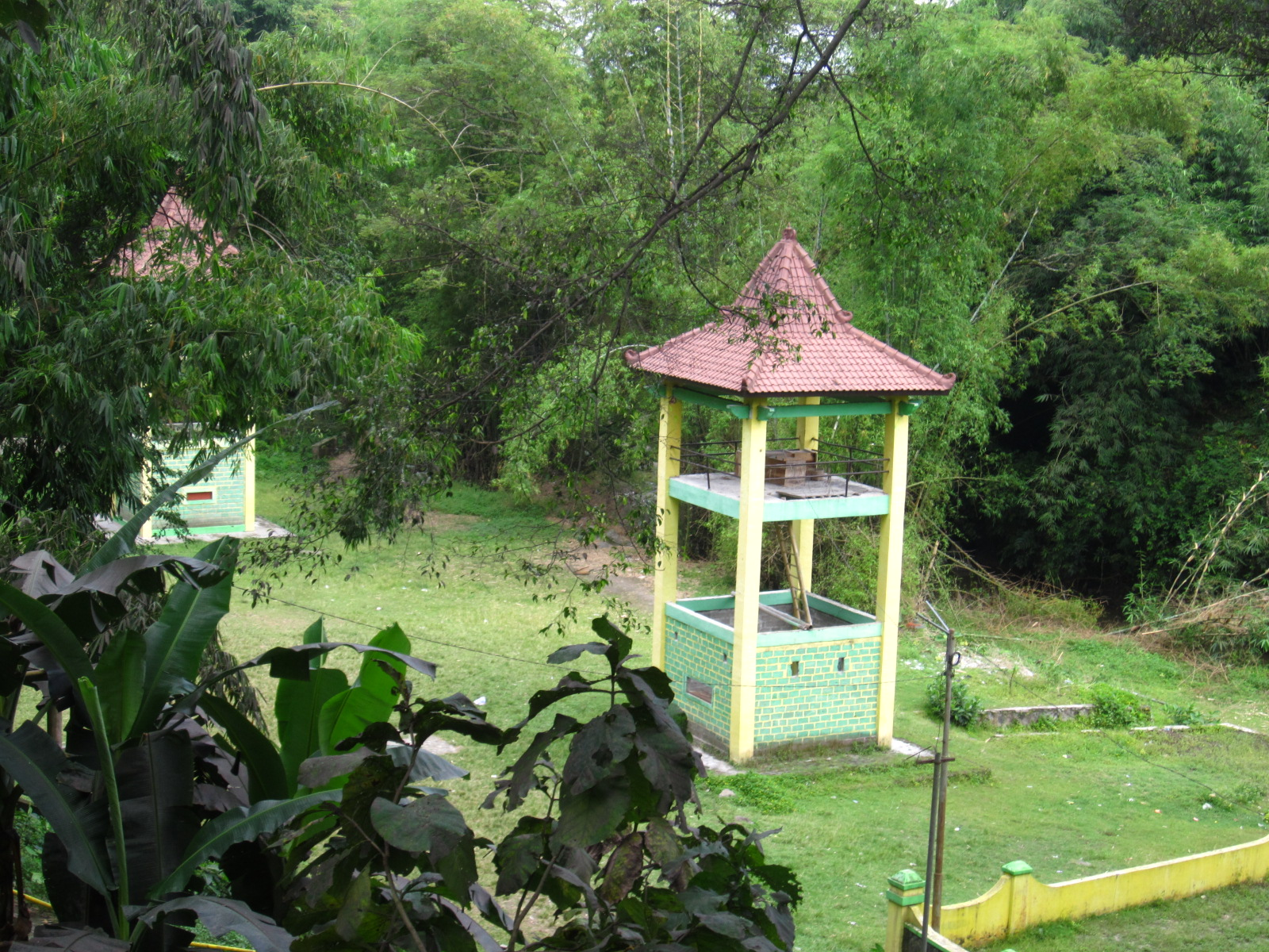 Panggung/menara untuk membagikan apem dengan dilempar kepada warga di sekitarnya.